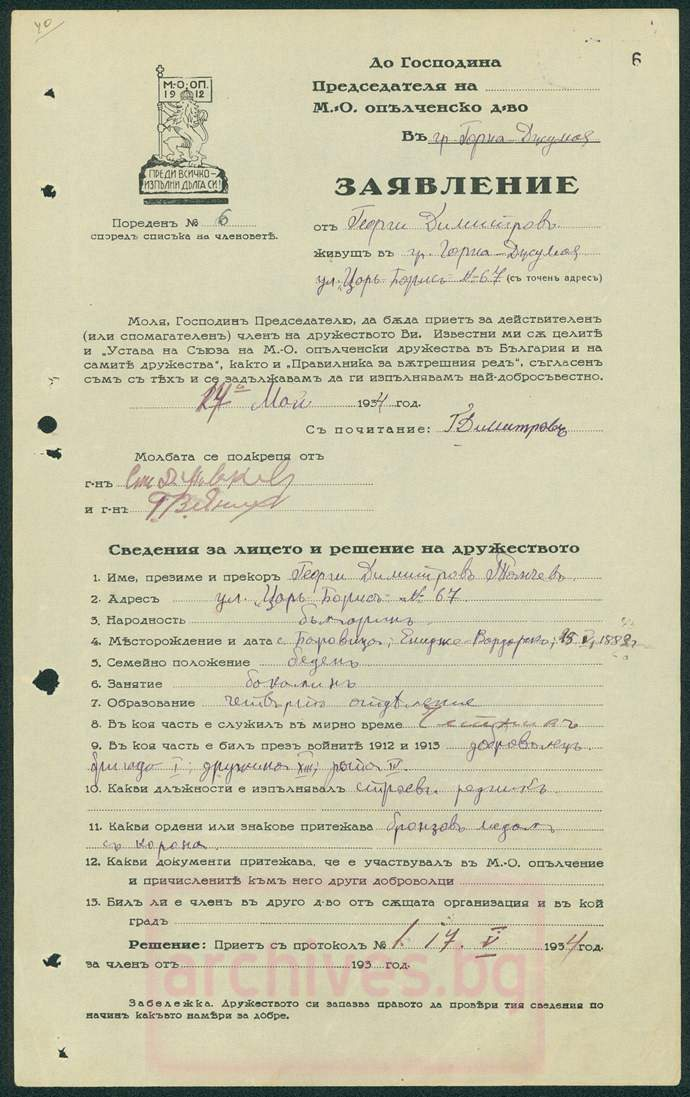 Заявление от Георги Димитров за членство в Македоно-одринското опълченско дружество в Горна Джумая. Горна Джумая, 24 май 1934 г.